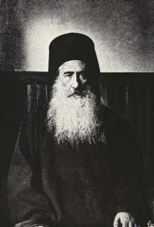 Серафим Скарулис